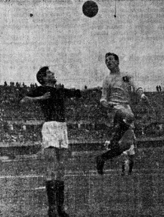 Valentino Mazzola stacca di testa. Licensing Categoria:Immagini di Valentino Mazzola